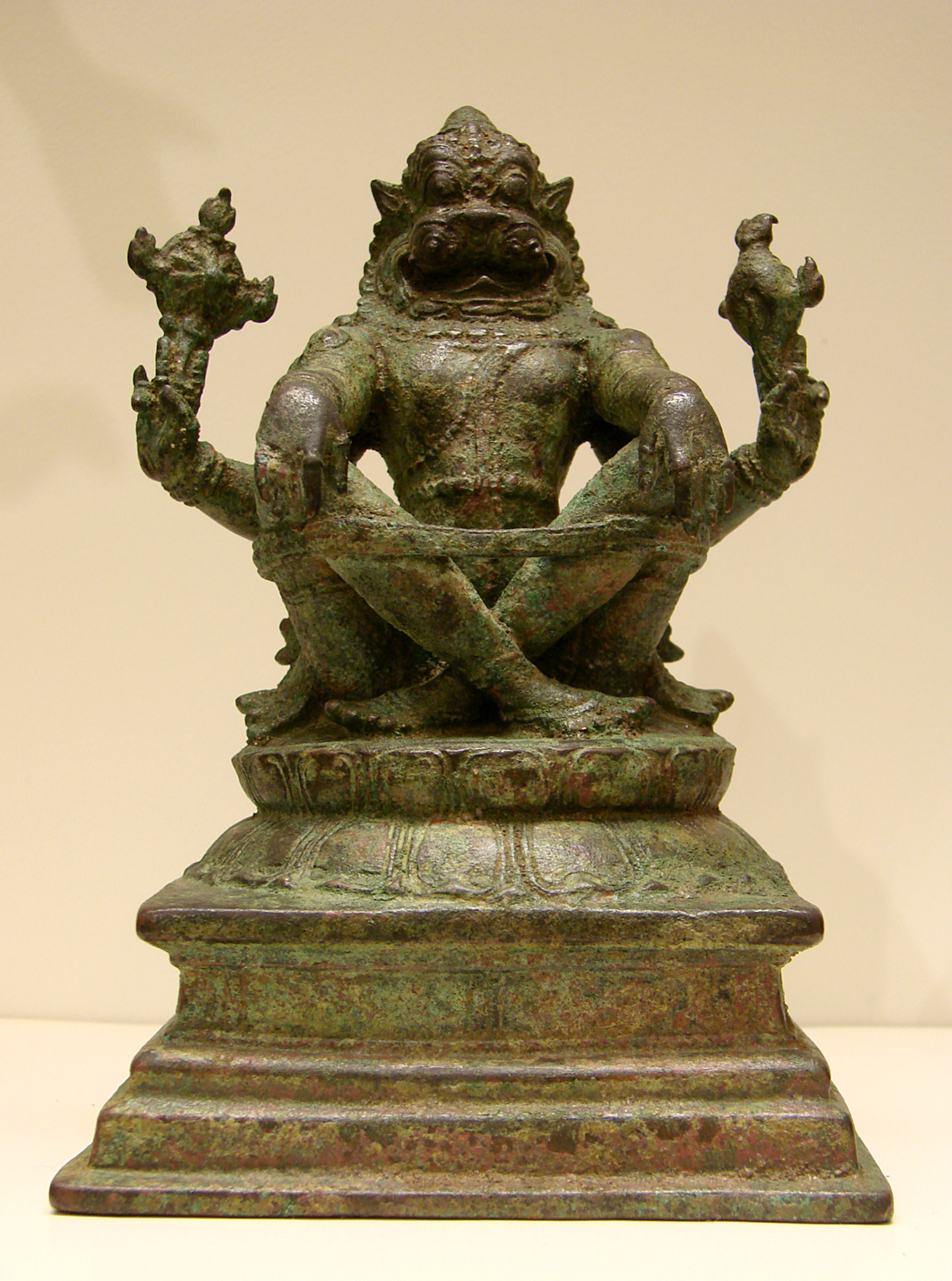 Narasimha, homme - lion avatar de Vishnou. Inde, Tamil Nadu, époque Chola, 12ème - 13ème siècle. Musée Guimet, Paris.